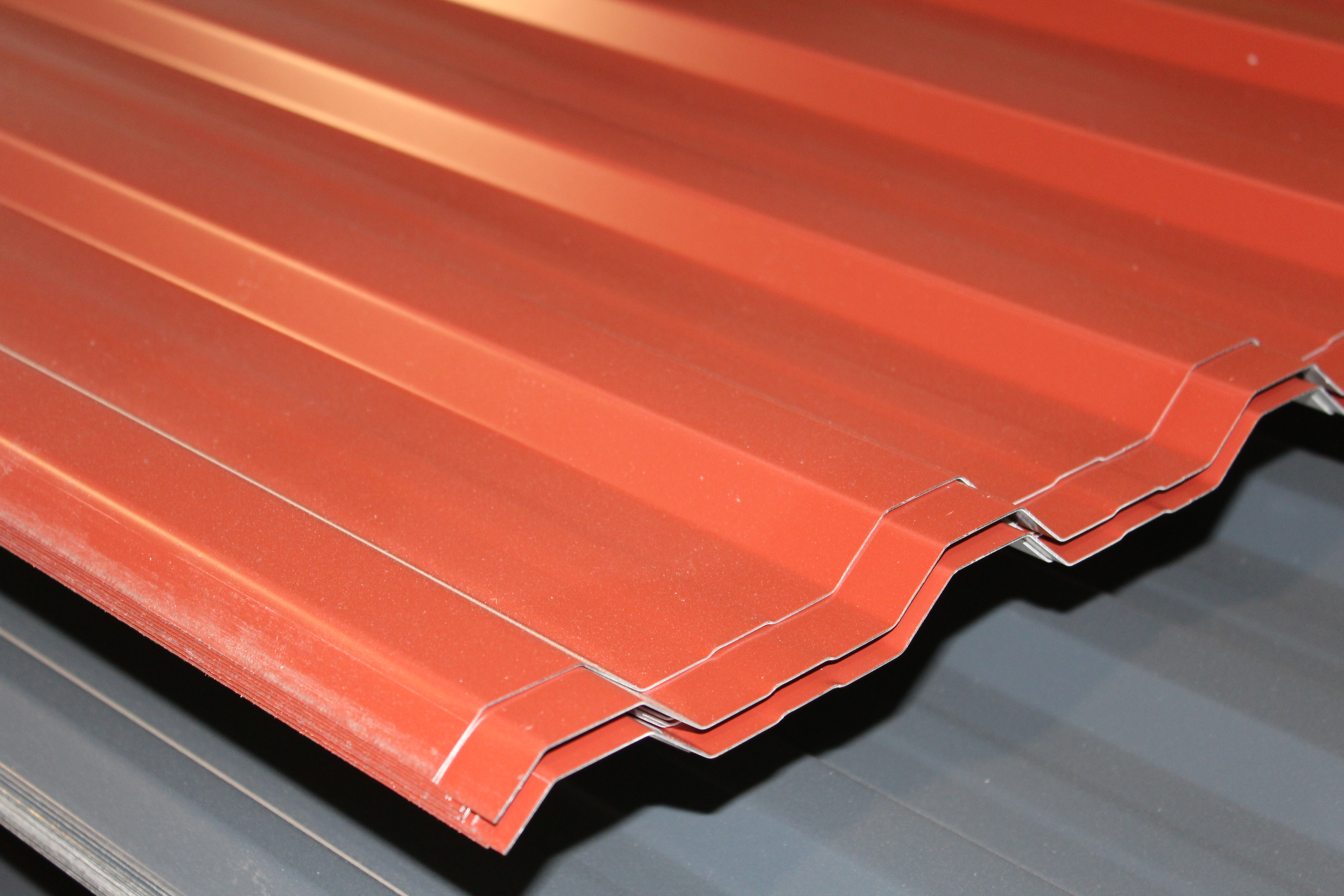 Nordblech 18 (18er Trapezblech 18/137)